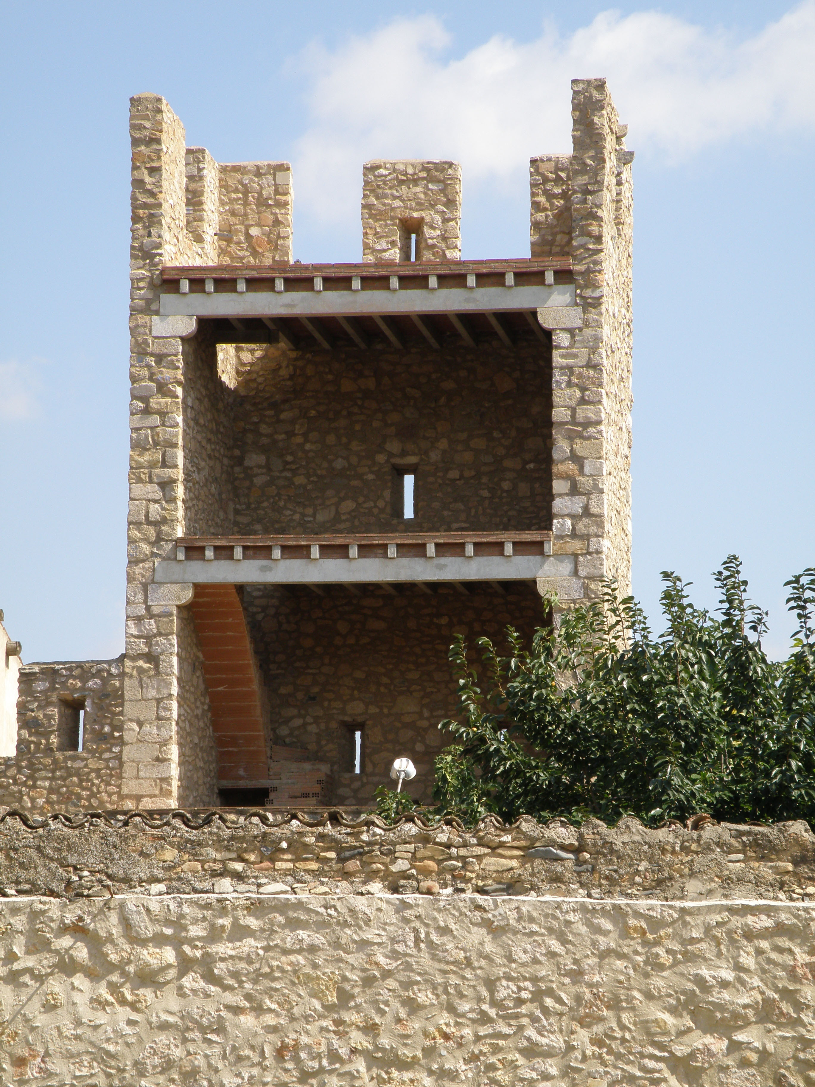 Interior d'una torre del recinte emmurallat de Montblanc, Conca de Barberà.